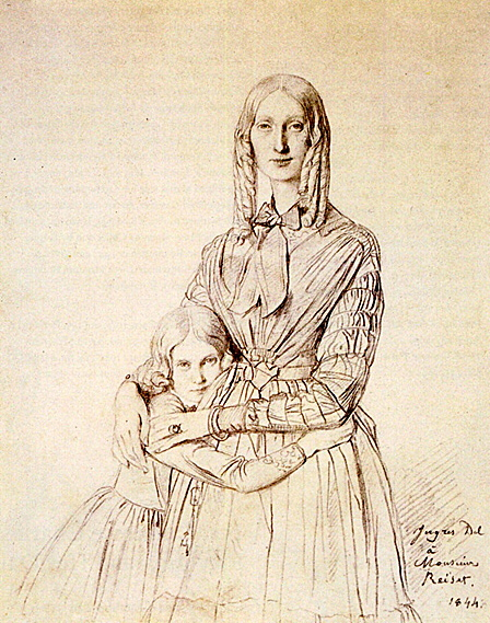 Madame Frédéric Reiset and her daughter Therese Hortense Marie.